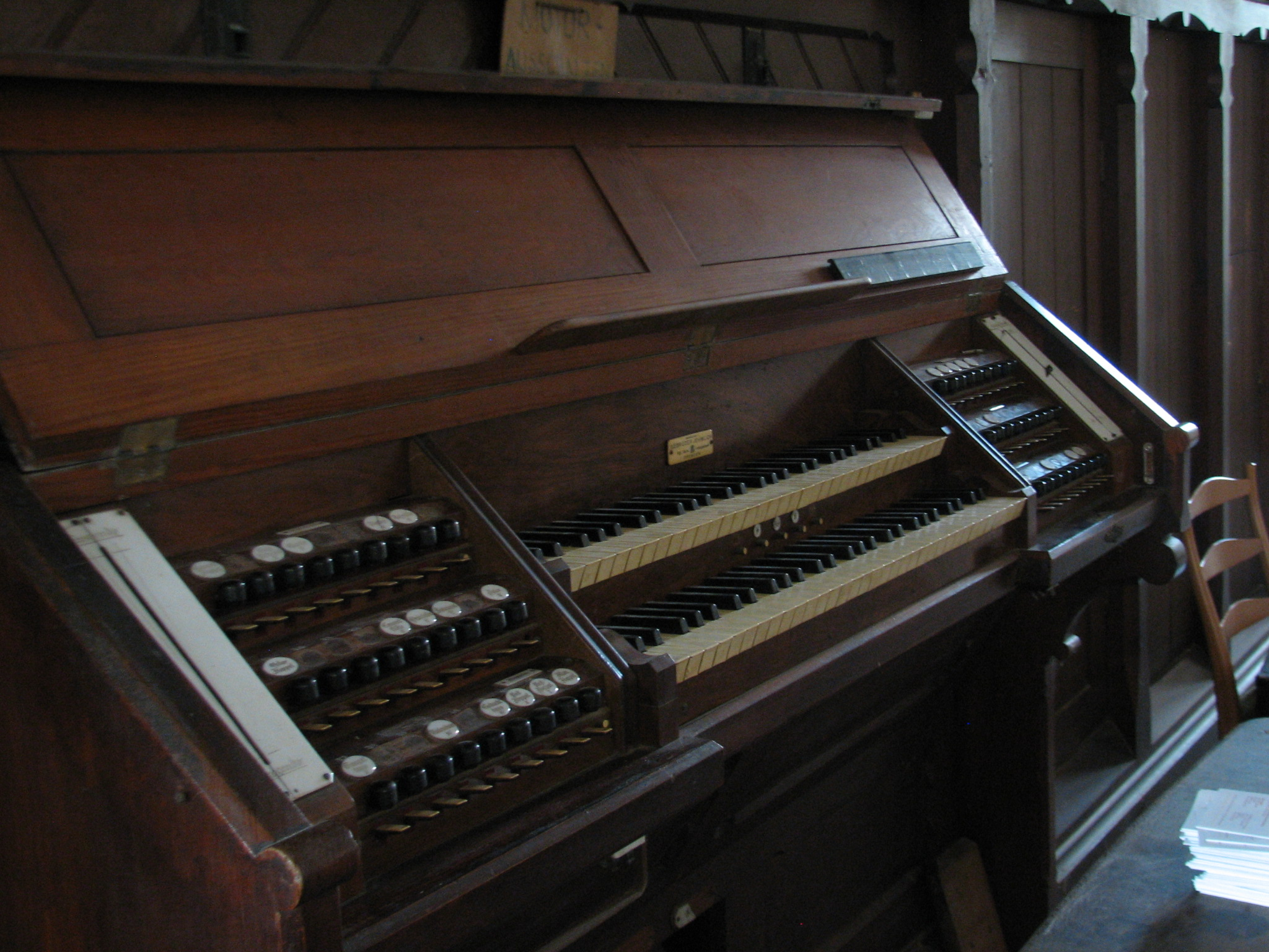 Spieltisch der Jemlich-Orgel von 1902 - Zustand September 2017